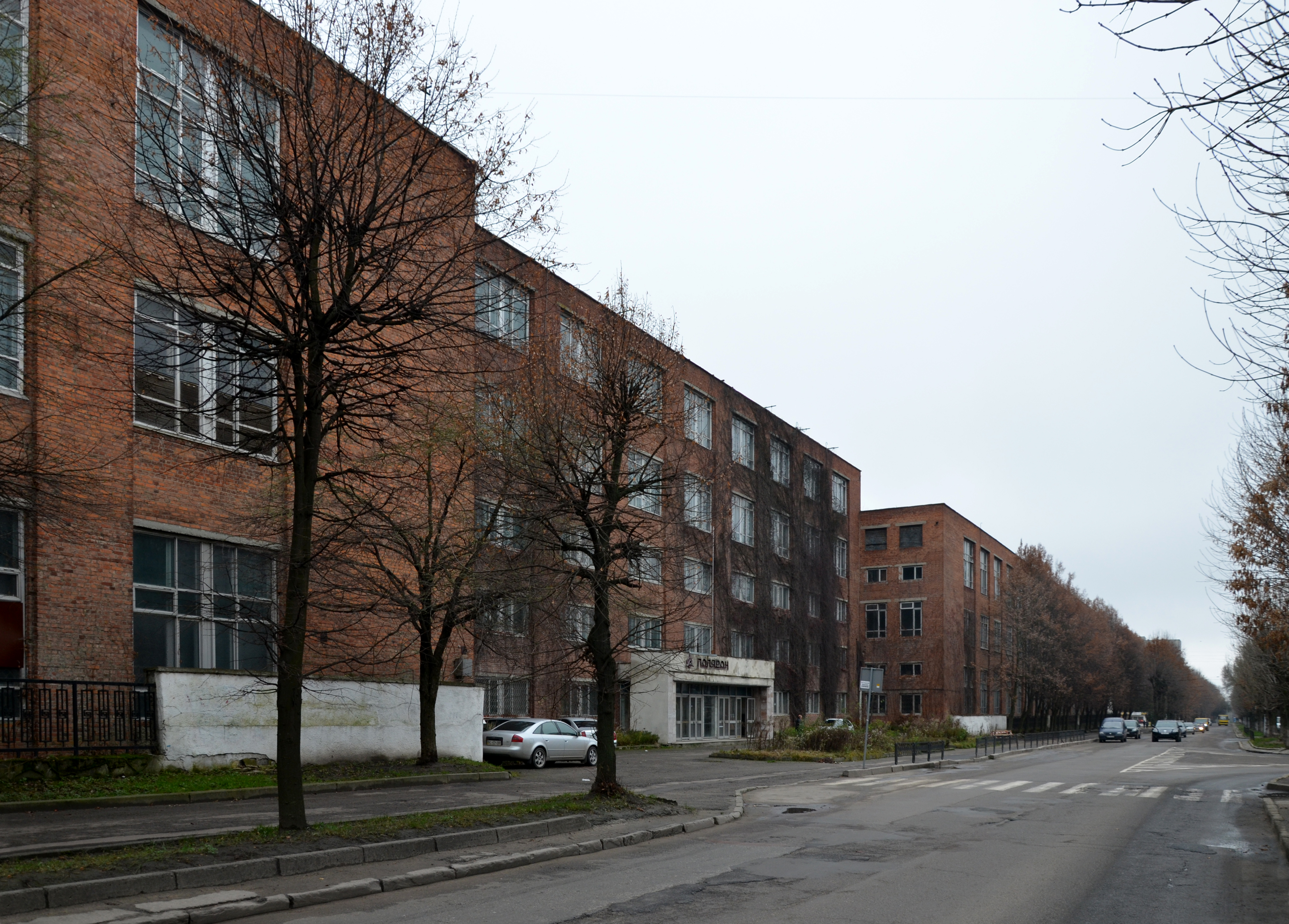 Вулиця Угорська у Львові.